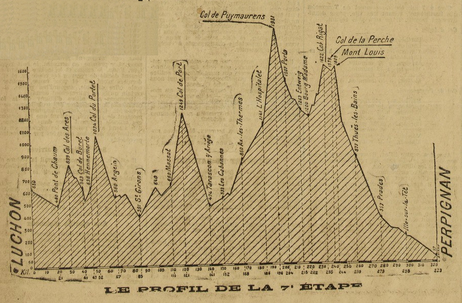 Tour de France 1919. Profil 7e étape